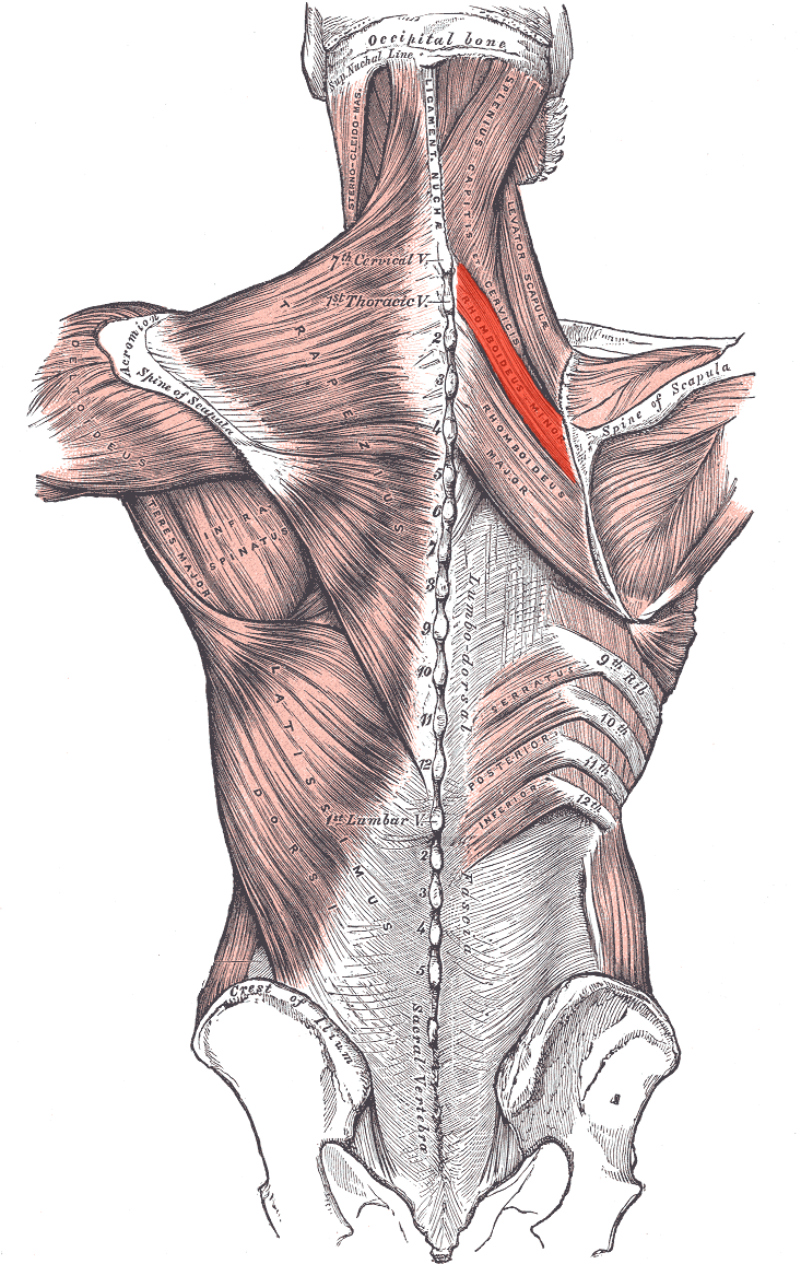 Rhomboideus minor muscle